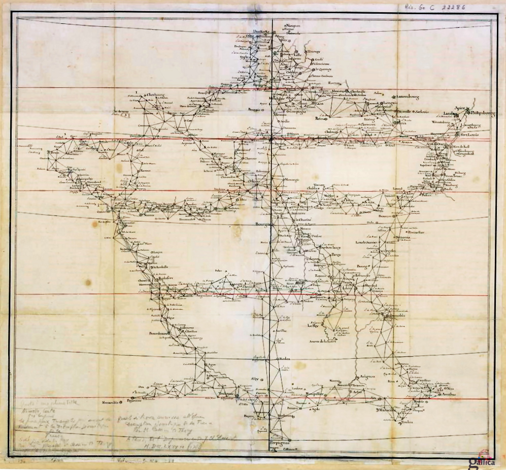 Nouvelle carte qui comprend les principaux triangles qui servent de fondement à la description géométrique de la France, levée par ordre du Roy par mess. Maraldi et Cassini de Thury, ... Année 1744